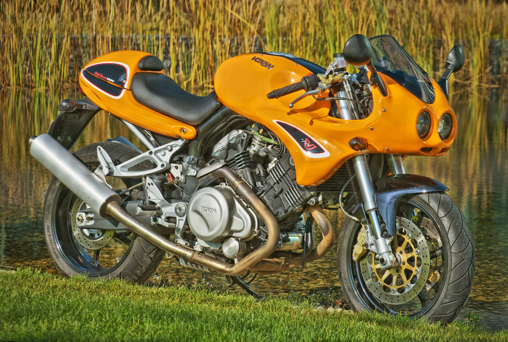 Voxan Cafe Racer